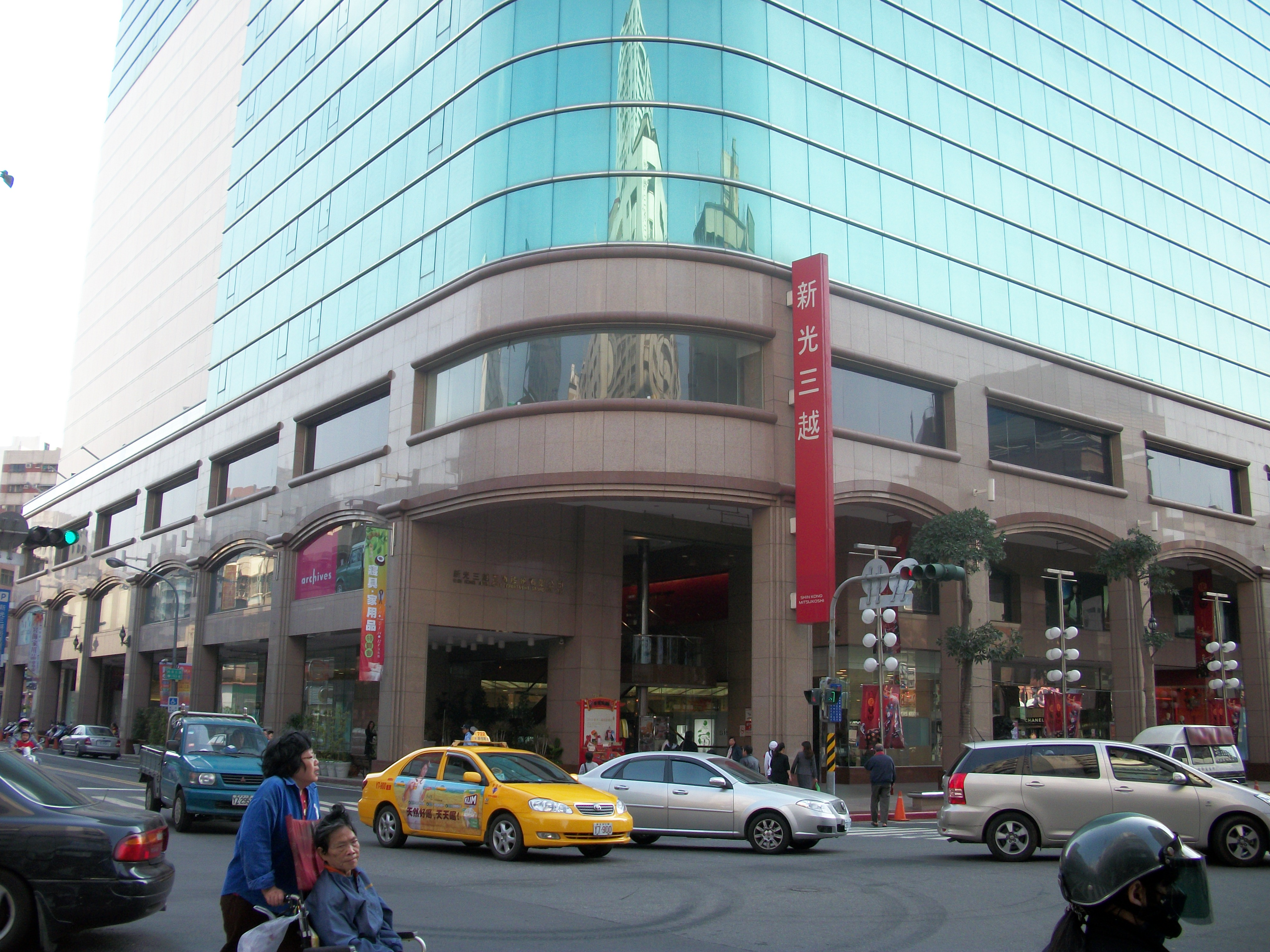 中文（台灣）: 新光三越百貨高雄三多店